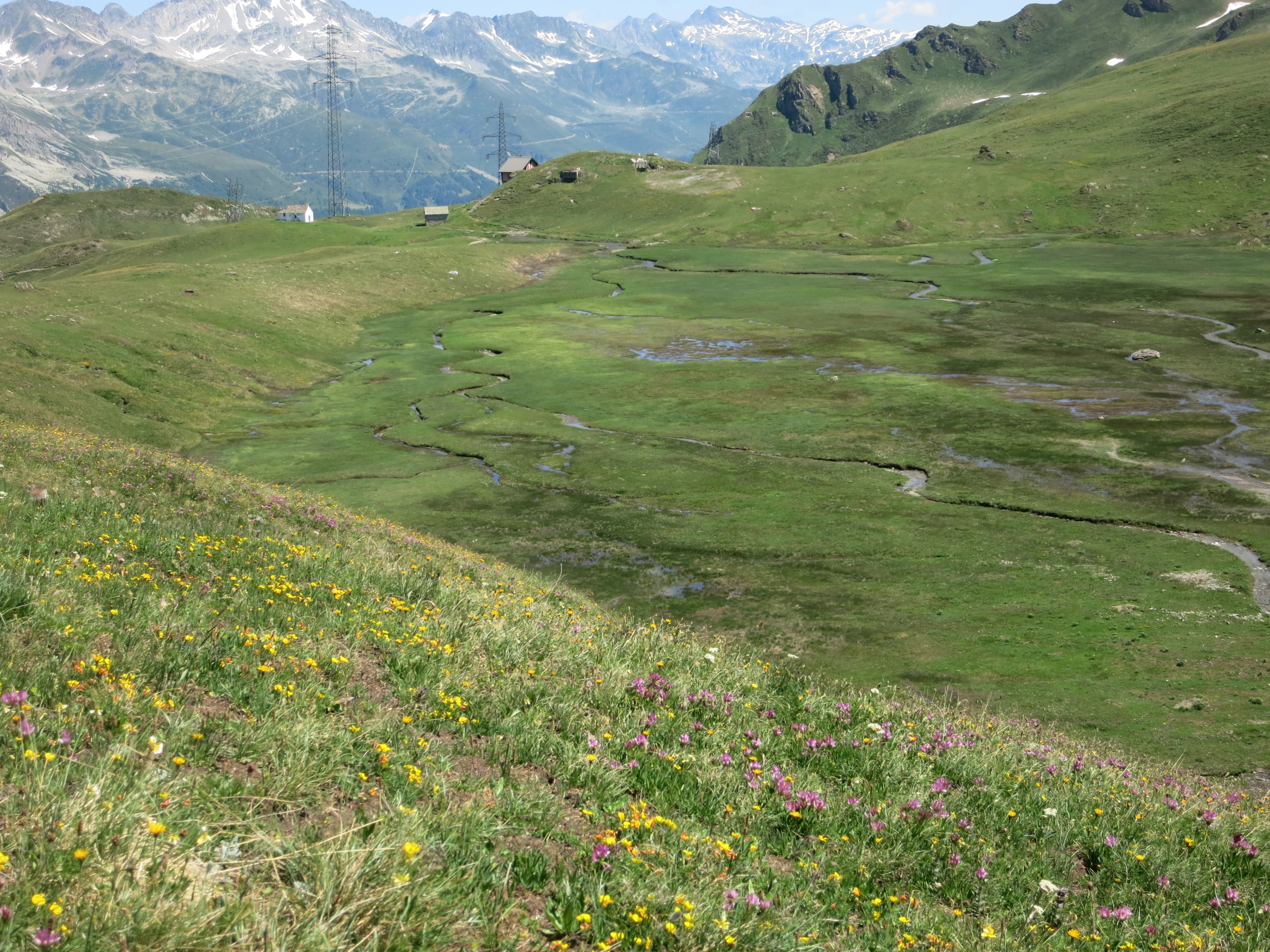 San Giacomo, Bedretto TI, Schweiz